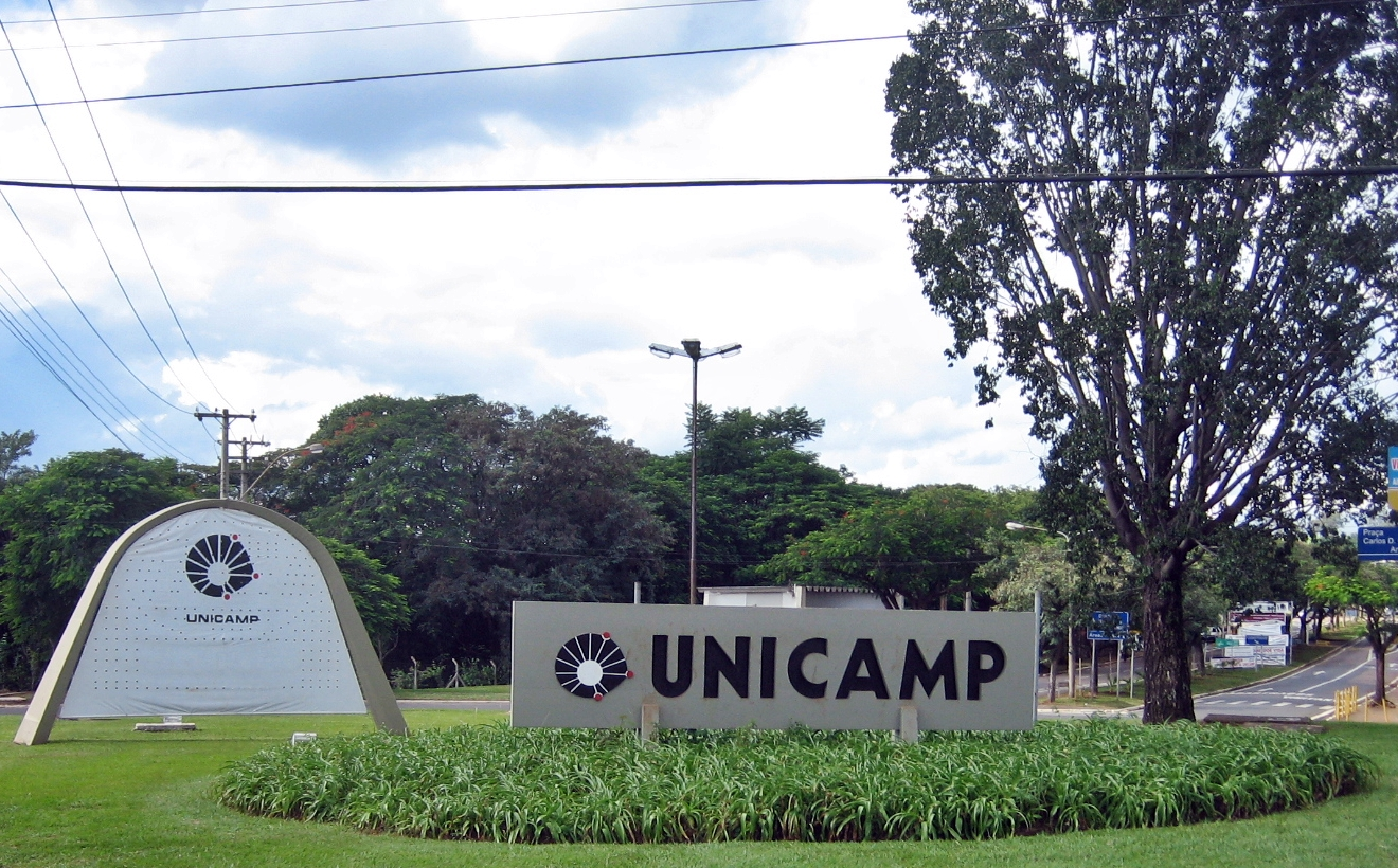 Monumento de pedra em uma das entradas da Unicamp.